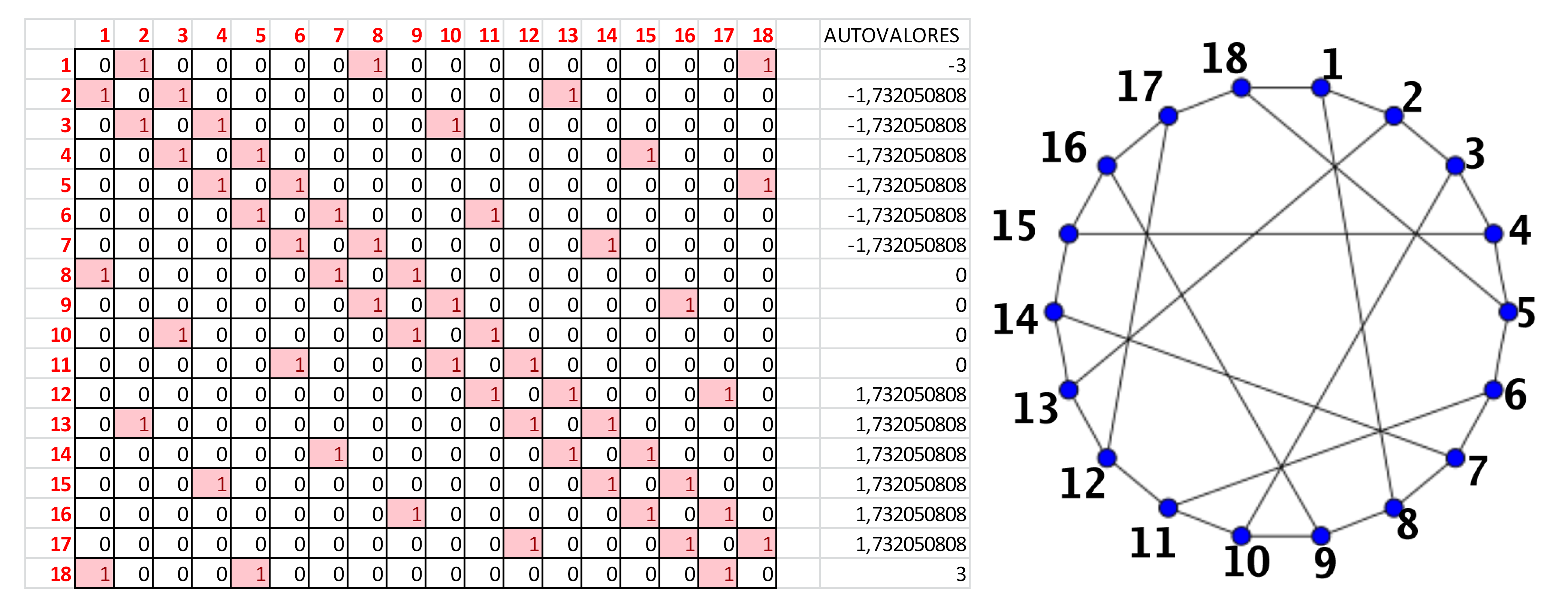 Grafo de Pappus, que de acuerdo con los autovalores de su matriz de conexiones, también es un grafo de Ramanujan